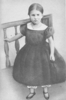 Vera Figner (1852-1942)